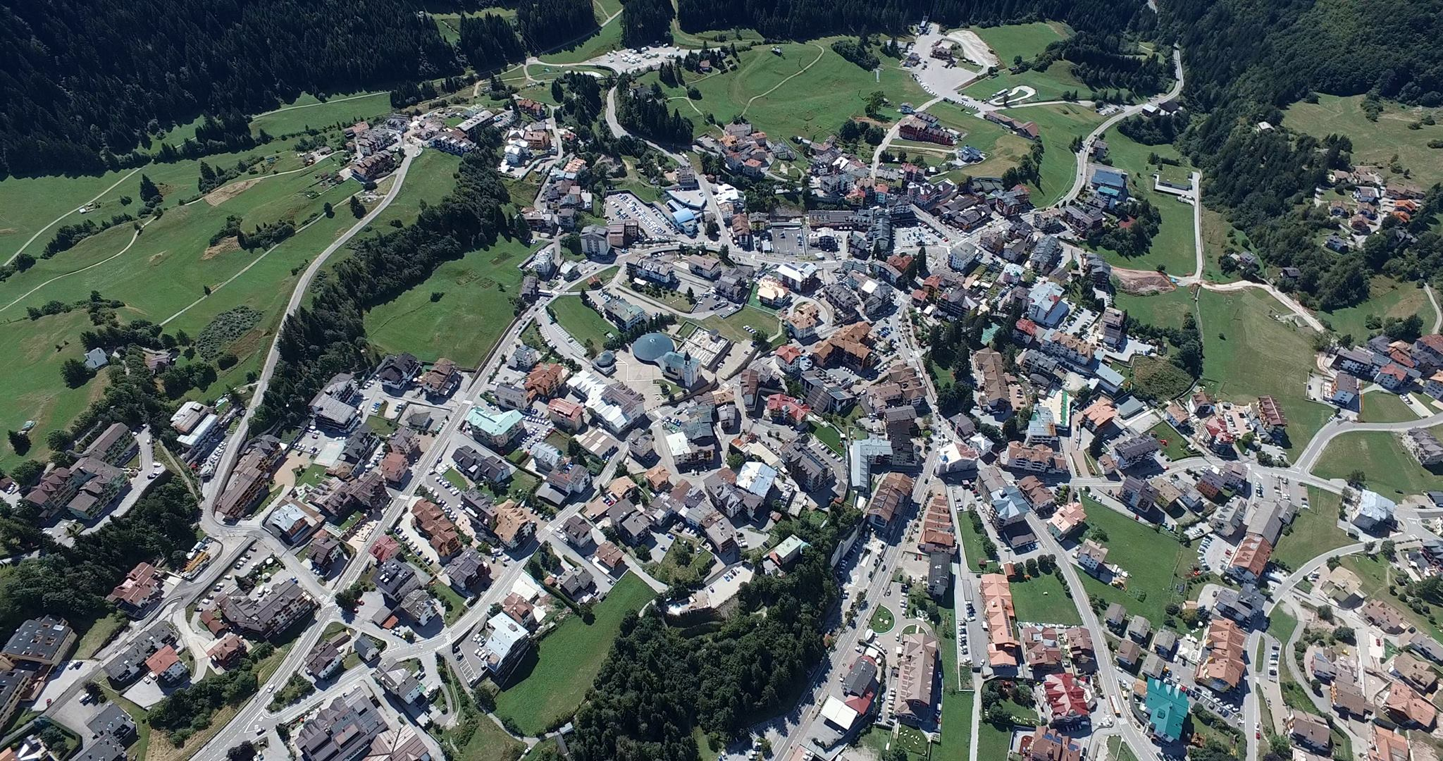 Andalo vista dall'alto